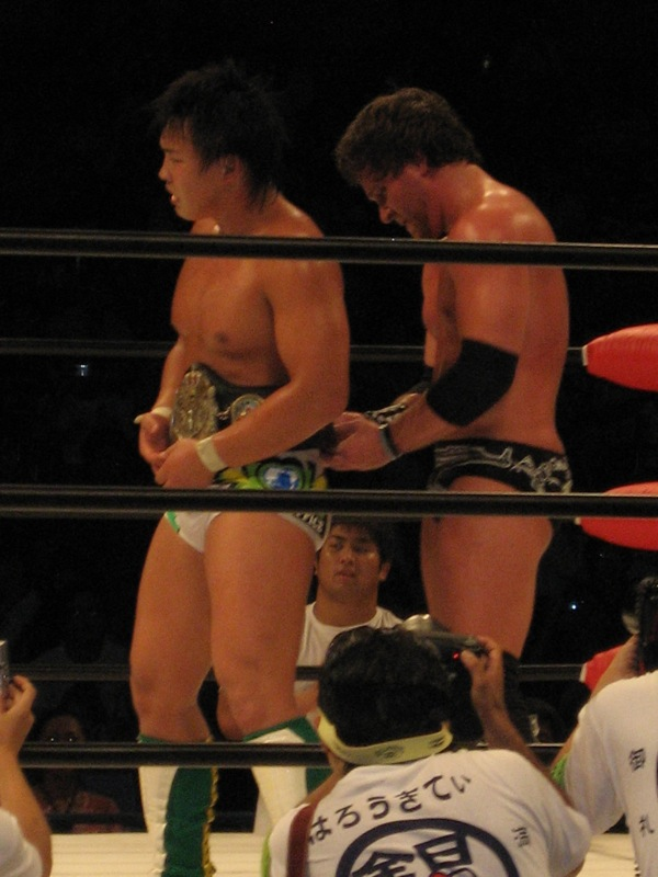 Chris Sabin Puts Belt on Katsuhiko Nakajima in August 2007.